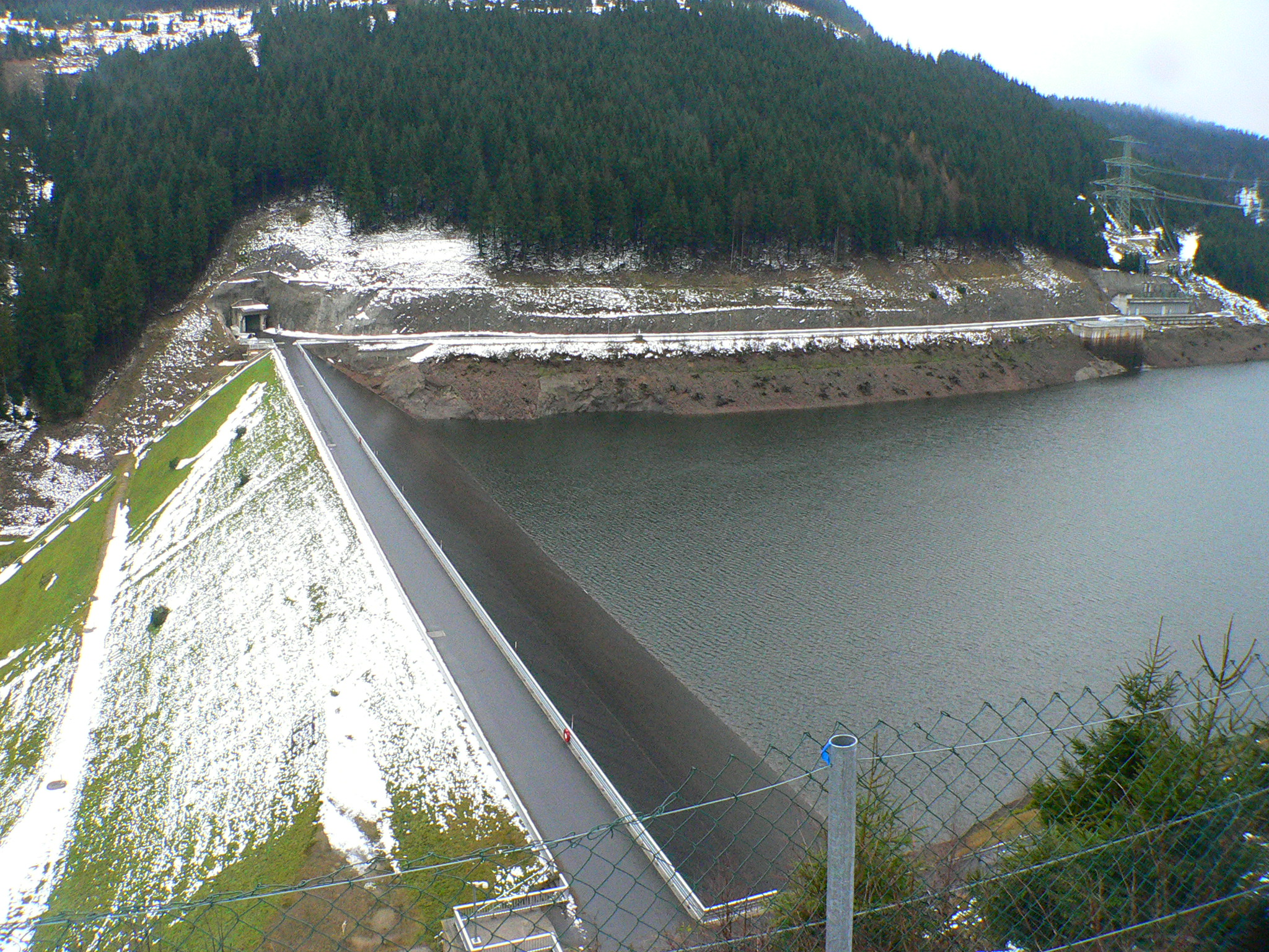 Pumpspeichersee Goldisthal (Schwarza), Damm des Untersees